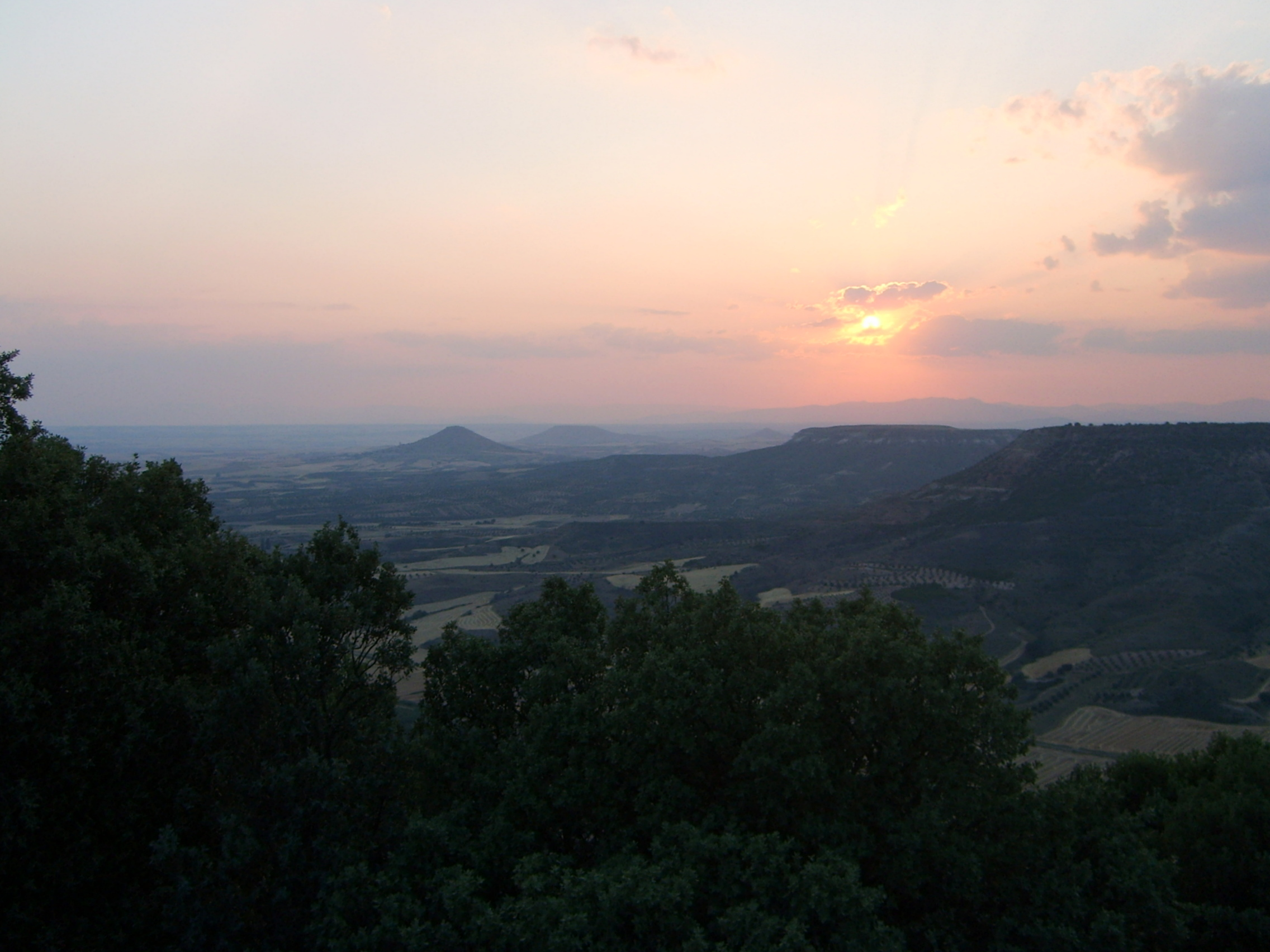 Castilla-La Mancha cerca de Trijueque Fechada el 8 de juli de 2006, 21:18:14 de user:Martin253